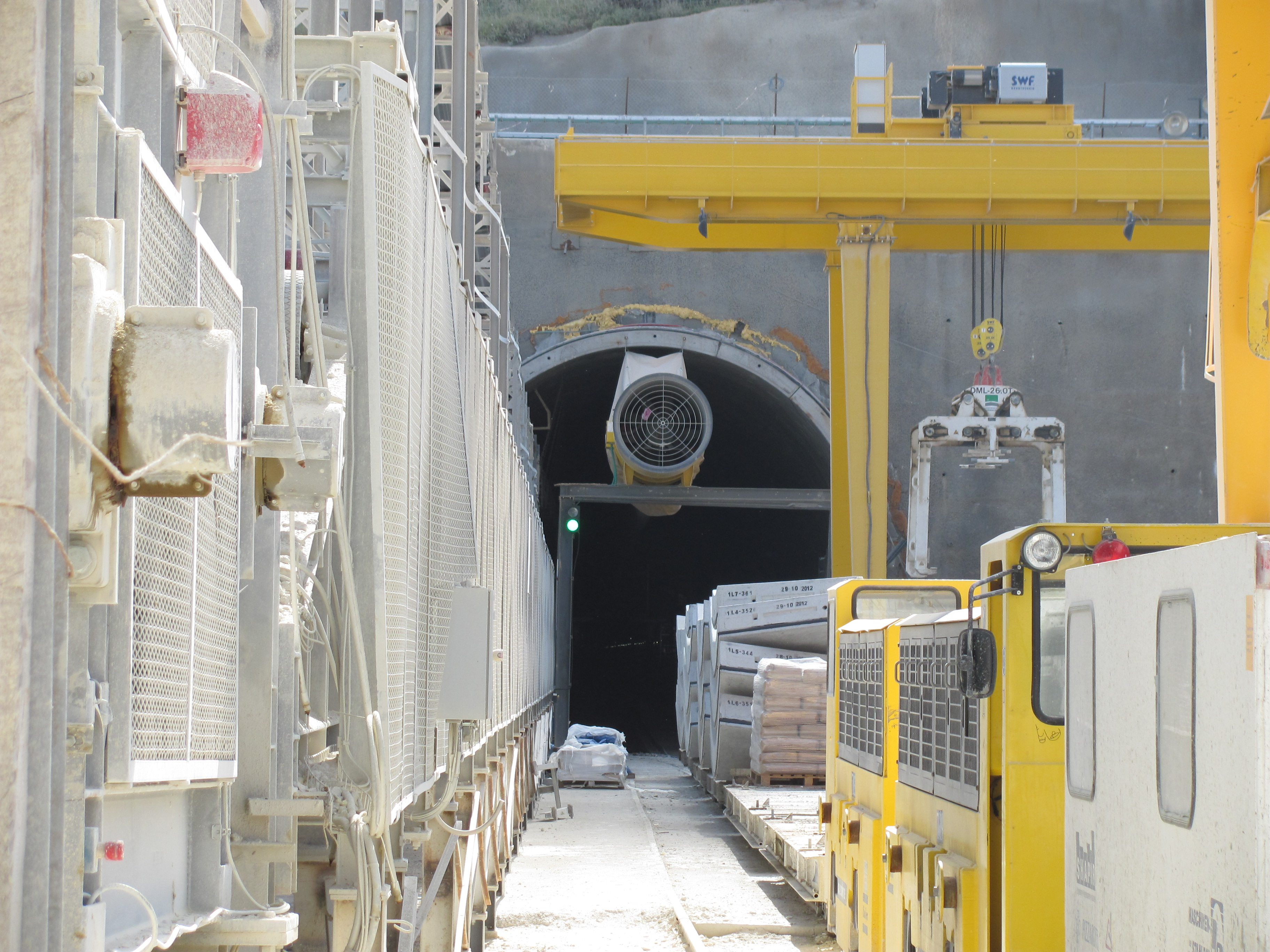 קו הרכבת המהיר לירושלים מנהרה 3 הצפונית, יציאה מערבית